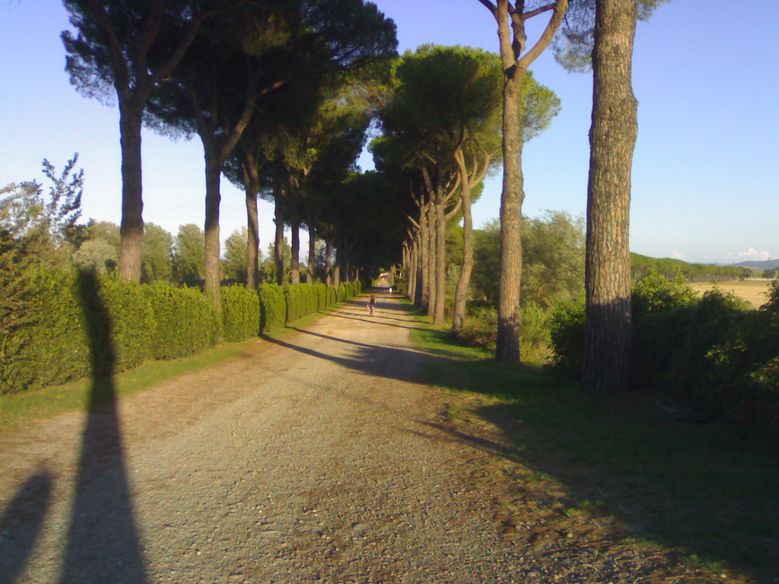 Entrata della cascine di Tavola